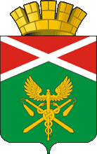 Герб Ирбитского муниципального образования, Свердловская область